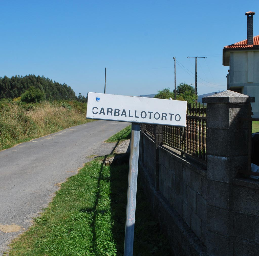 Cartel de acceso a Carballotorto, Aranga A Coruña Galiza Spain